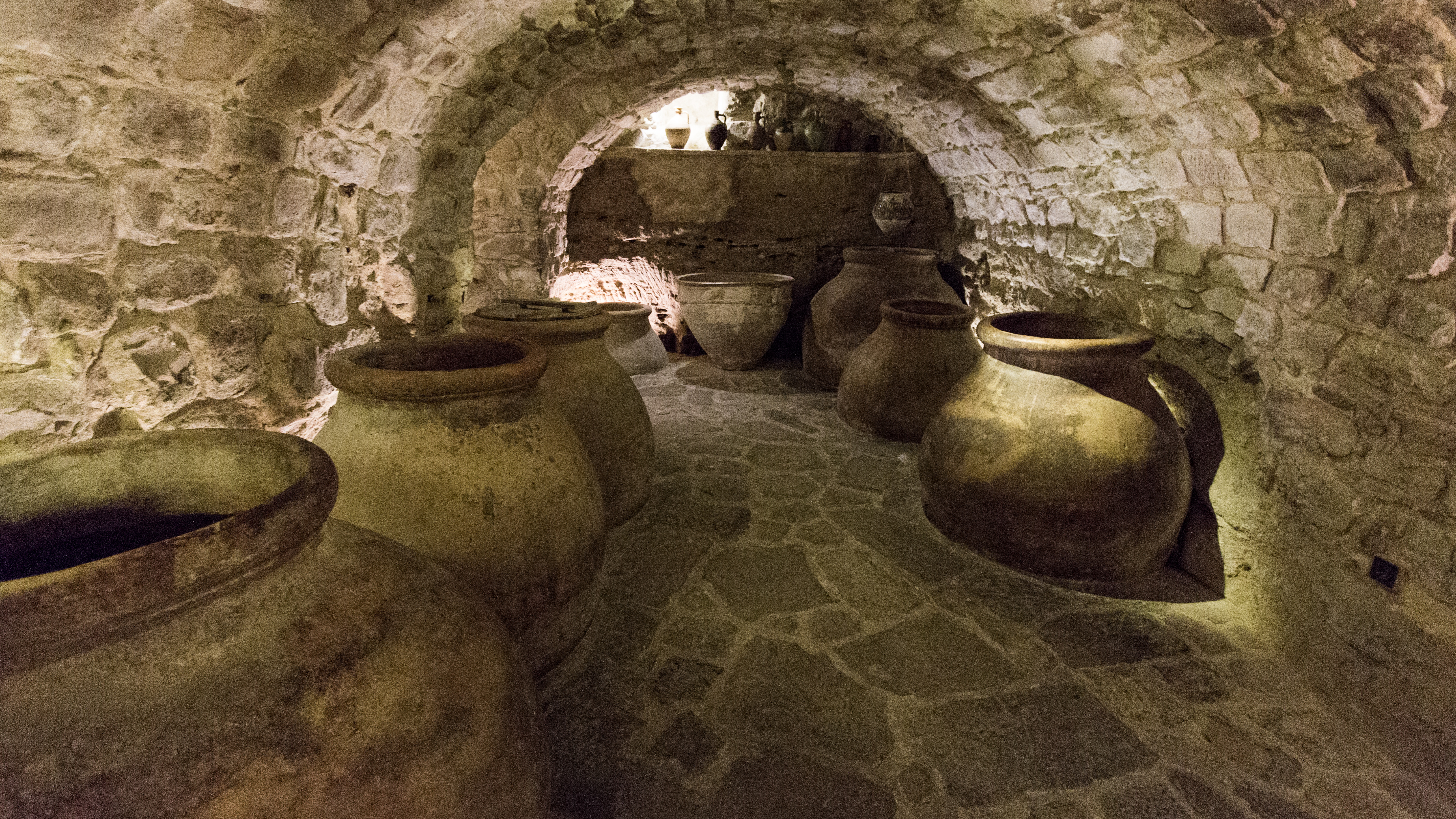 Bodega de la Sinagoga del Agua, Ubeda, Andalucía